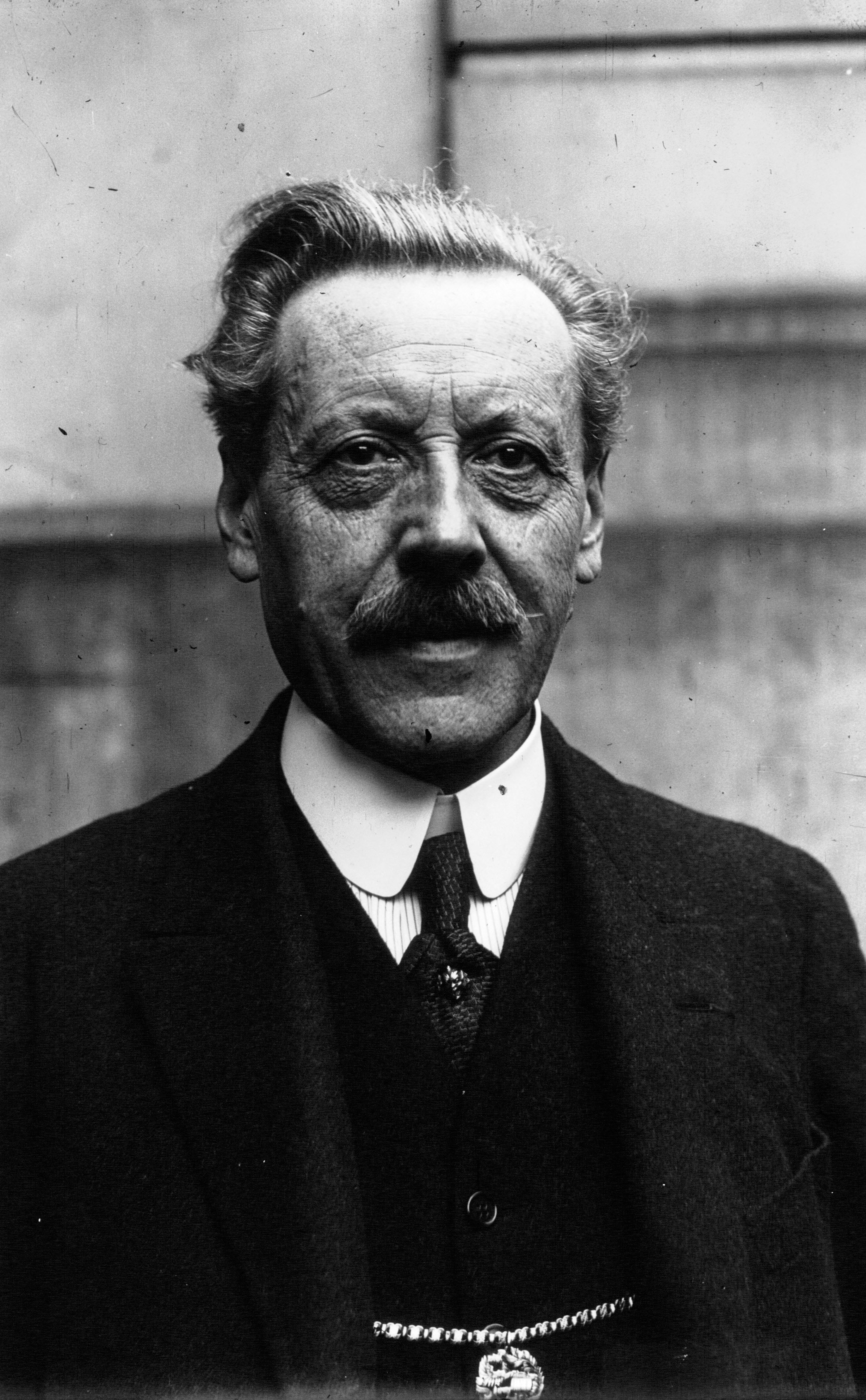 M. Léon Breton (France) vice-président du bureau de l'U.C.I., président de l'U.V.F.